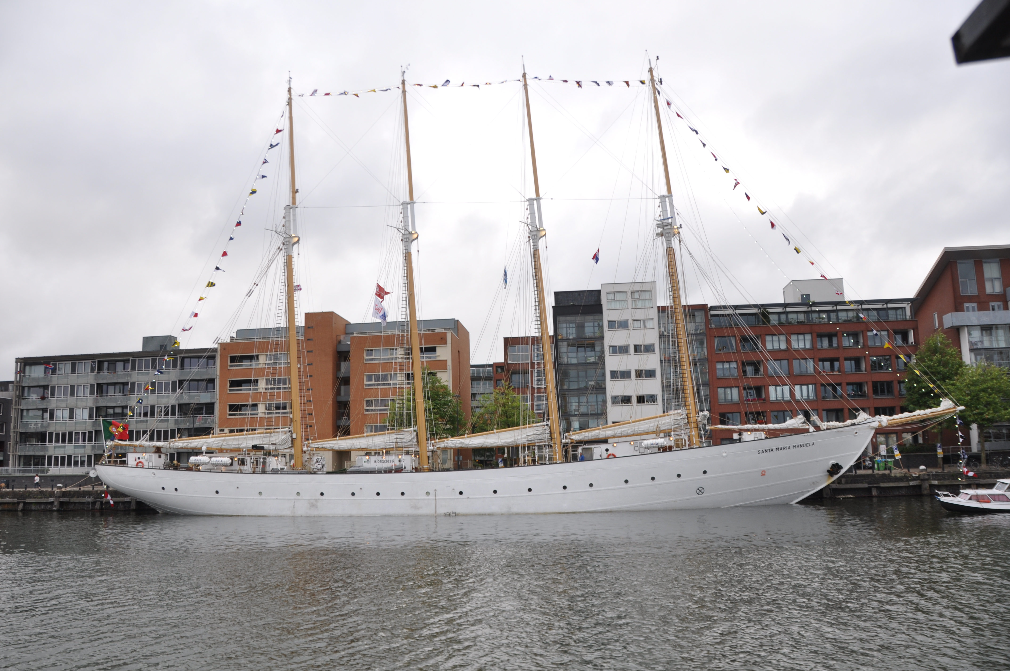 De SANTA MARIA MANUELA op SAIL Amsterdam 2010.